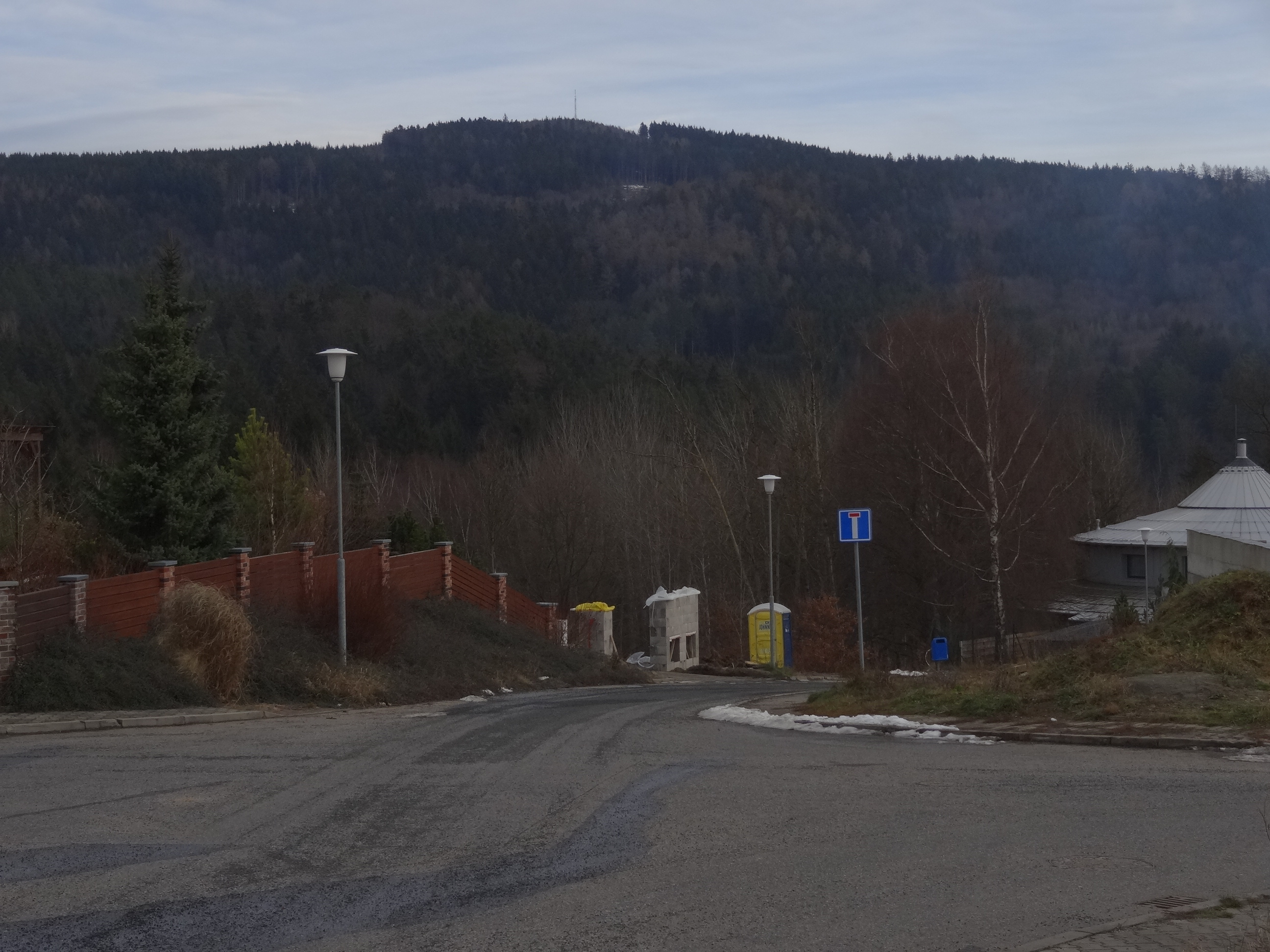 Ruprechtice (Liberec XIV) - pohled na Žulový vrch (743 m) z křižovatky ulic U Koupaliště a Přírodní